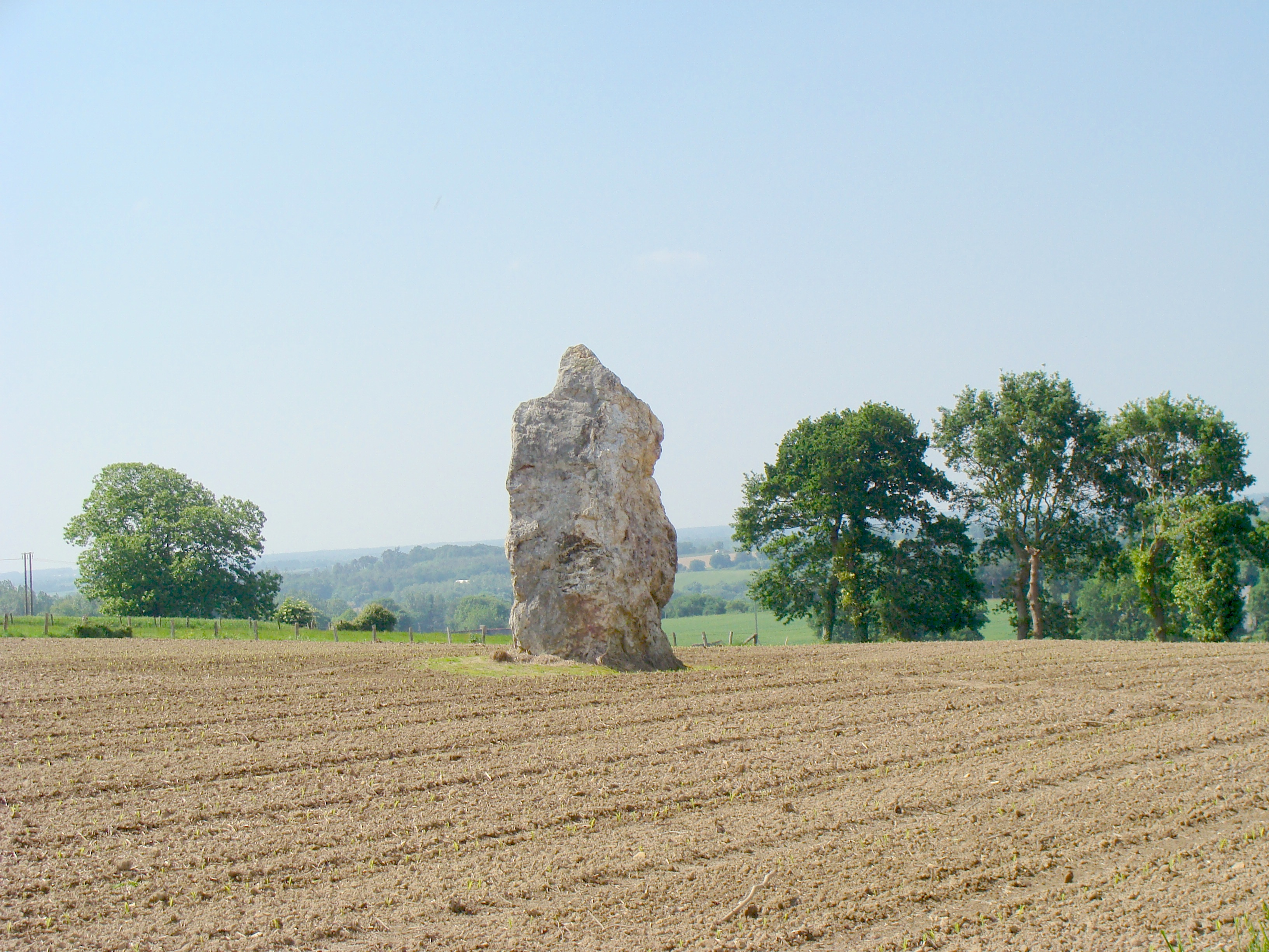 Menhir de La Pierre Longue, (Classement, 1967) .